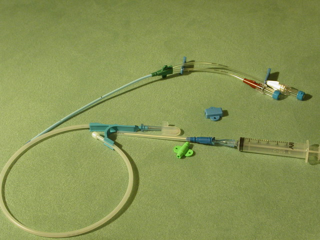 ZVK-Set mit Punktionsmaterial